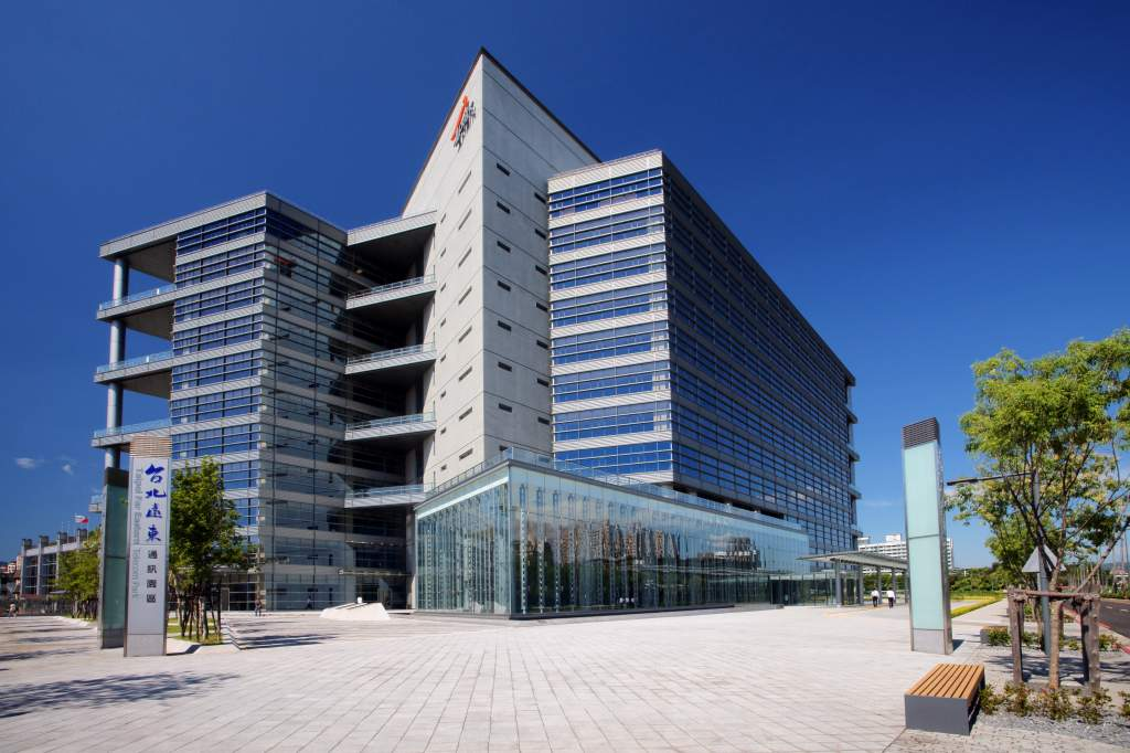 中文（台灣）: TPKA研發大樓為Tpark第一棟研發大樓，地上11層、地下2層的綠建築大樓，於2010年Q3完工，東側面臨四川路一段(20米寬、雙向4線道)，北側臨遠東路為大樓主要出入口。